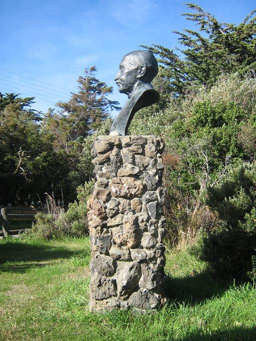 Edmundo Pisano, Chilean Botanist Sculpture in Skottberg Garden Instituto de Patagonia, Punta Arenas Chile